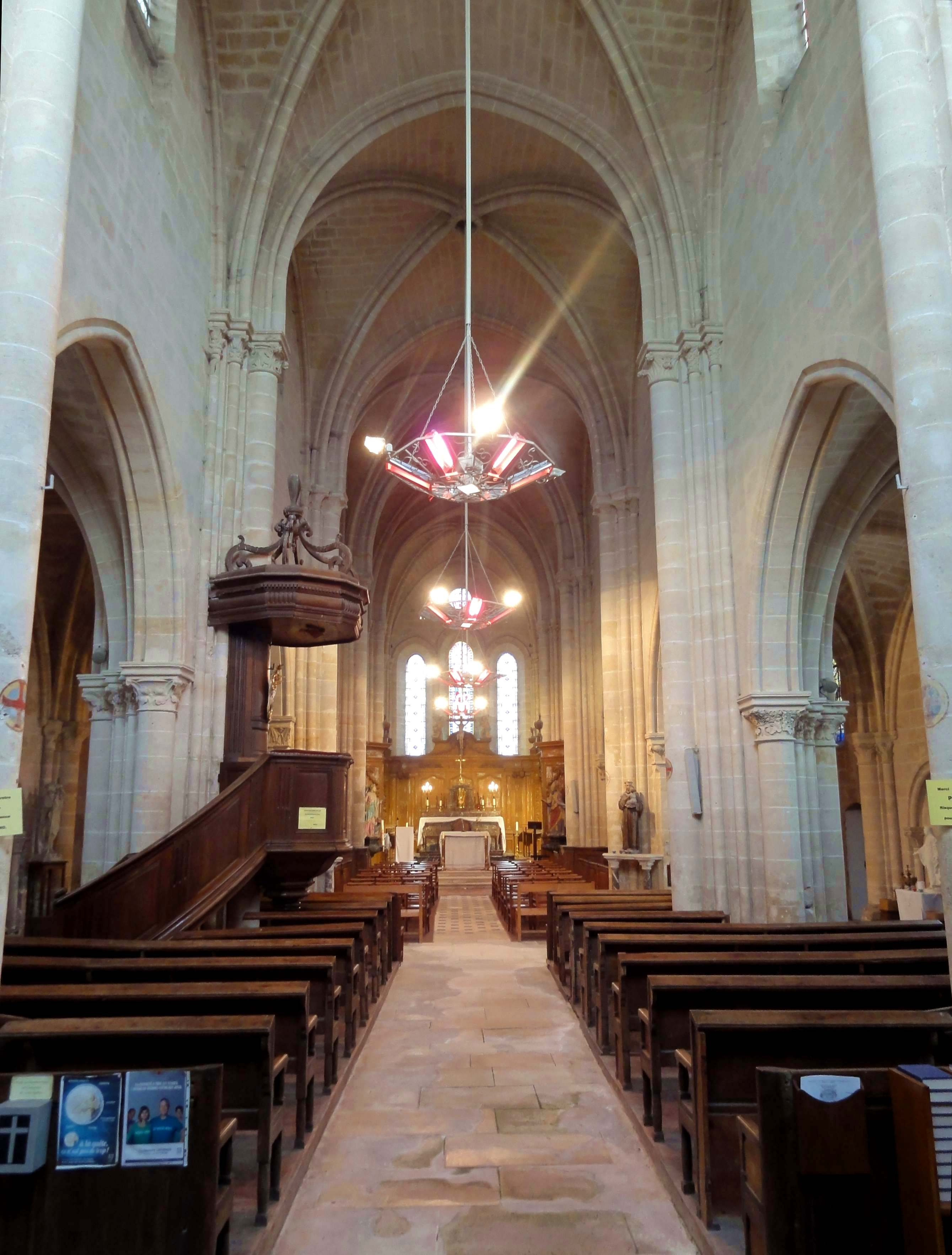 Intérieur de l'église - voir titre.